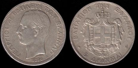 5 αργυρές δραχμές του 1876.